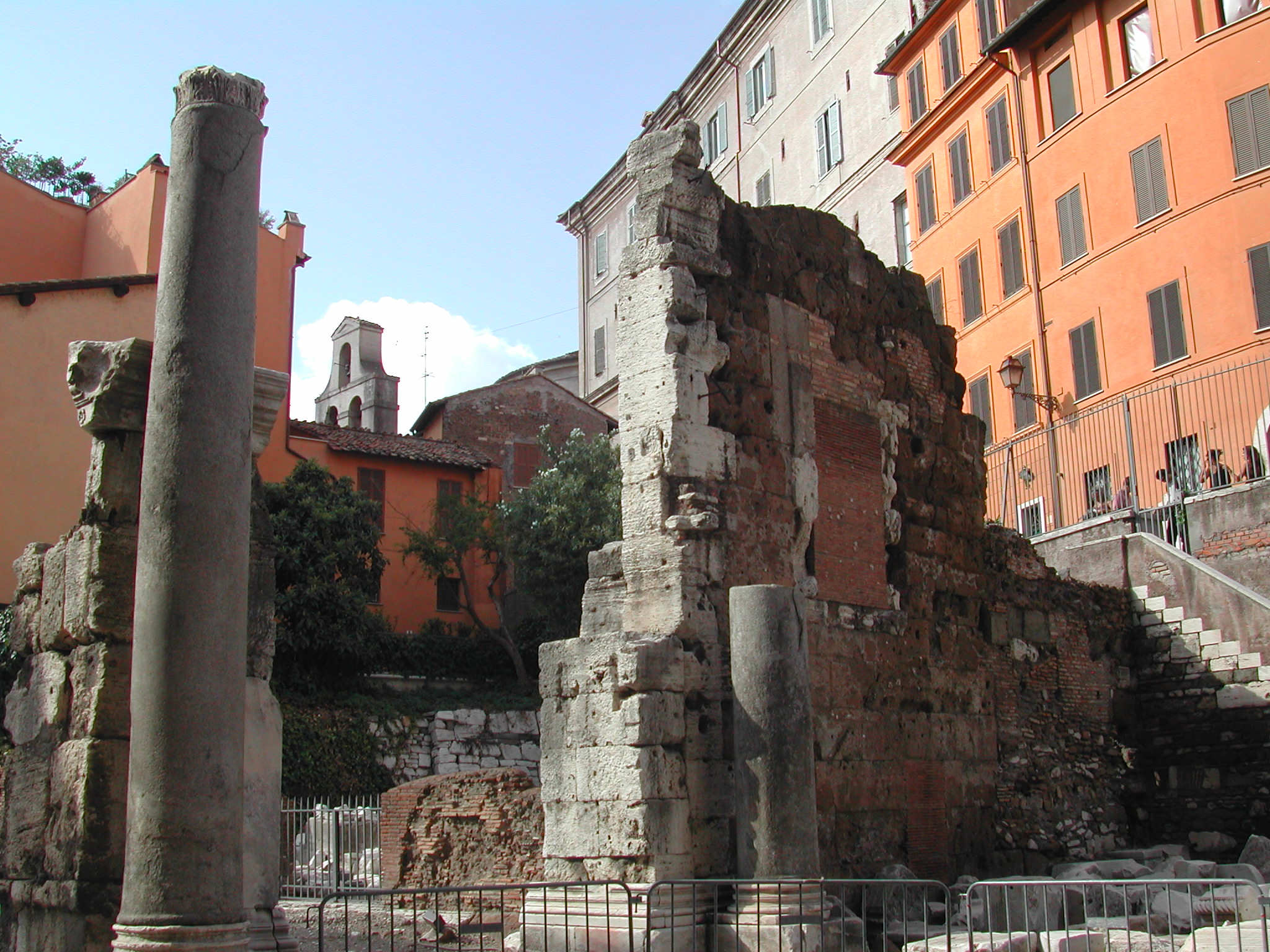 Roma, area archeologica del teatro di Marcello, tempio di Bellona.